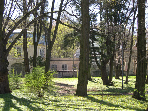 Pałac Goetz'a w Brzesku - część parkowa. Widok na Pałac Goetza.